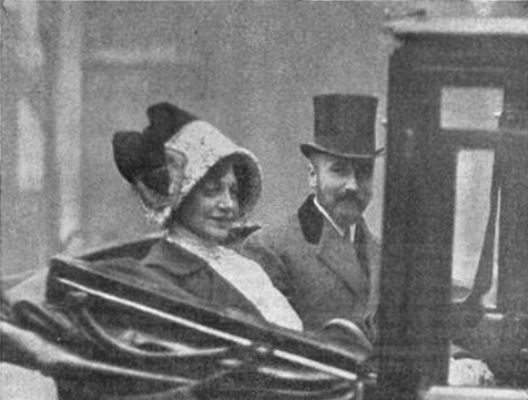 Л. Б. Яворская (княгиня Барятинская) и князь В. В. Барятинский.